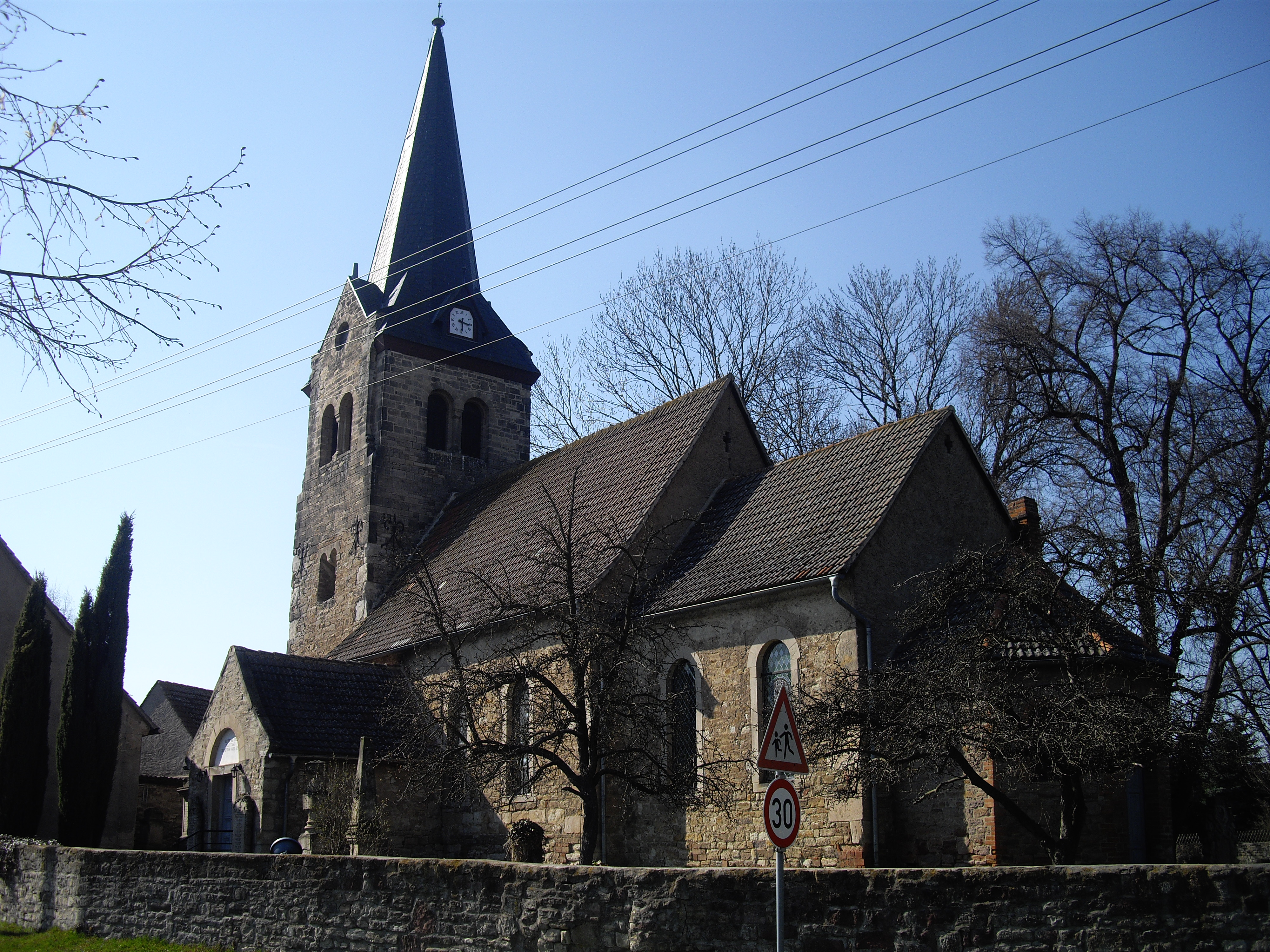 Die Dorfkirche von Freist im Landkreis Mansfeld-Südharz